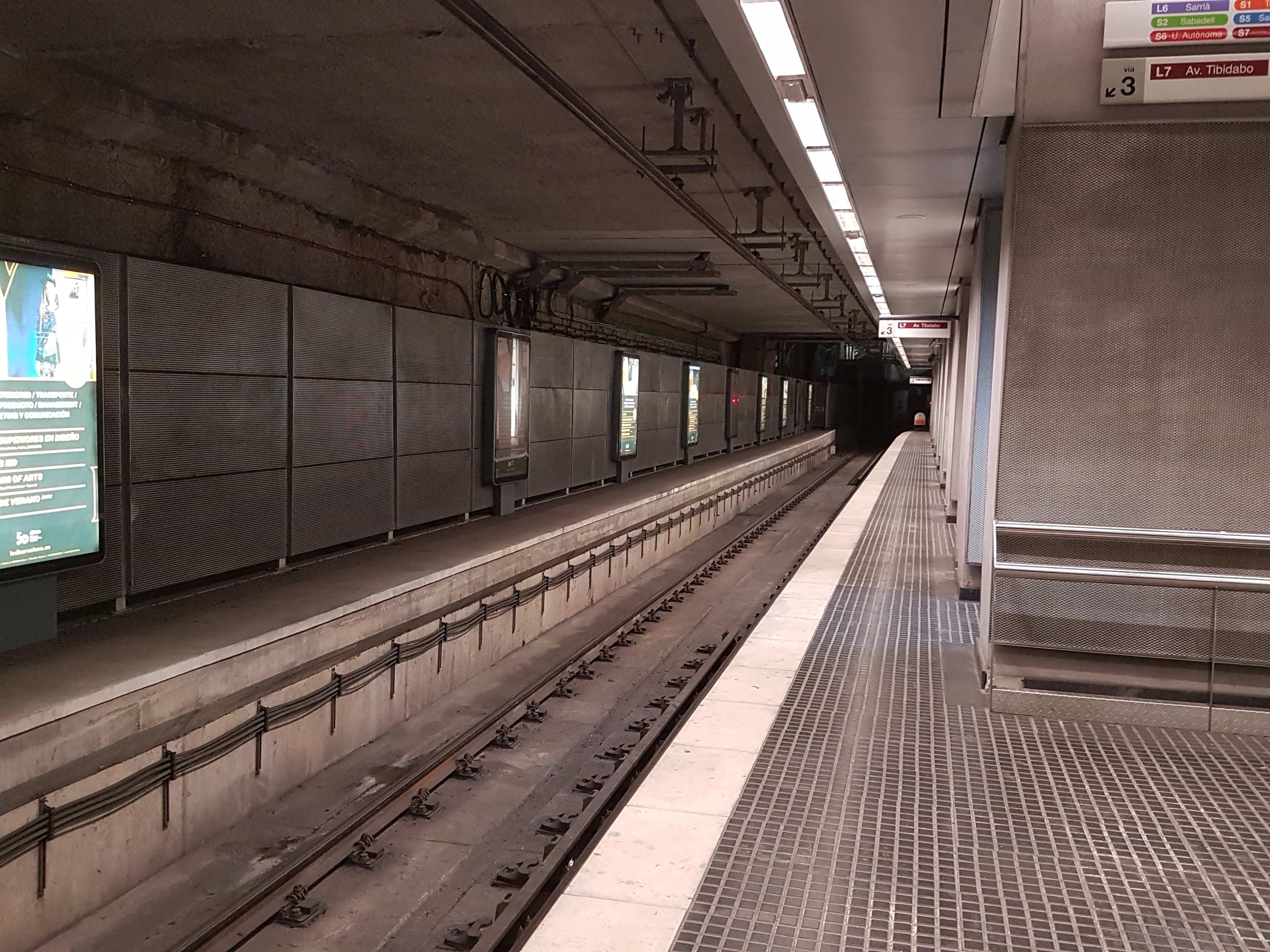 Via 3 de l'estació